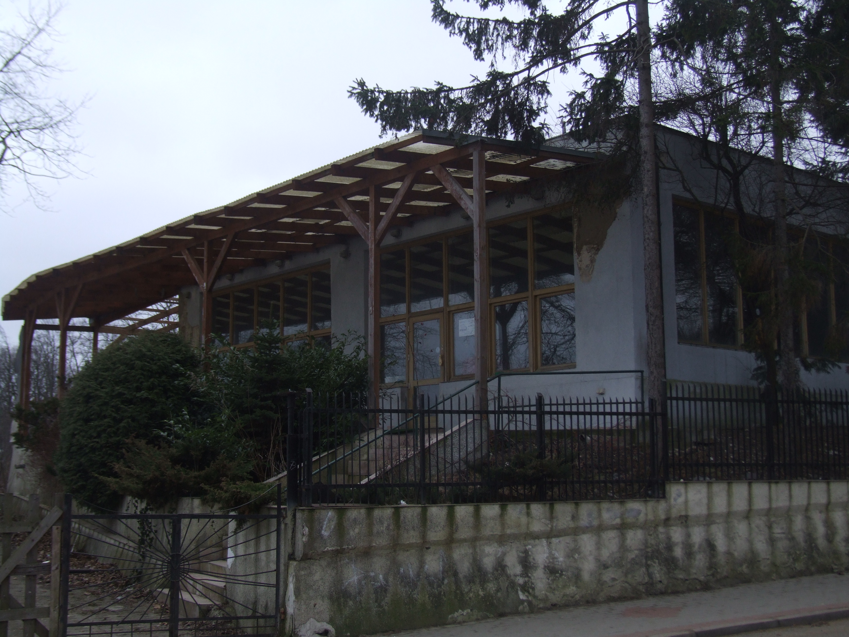 Bar Maksym, Orłowo - dzielnica Gdyni